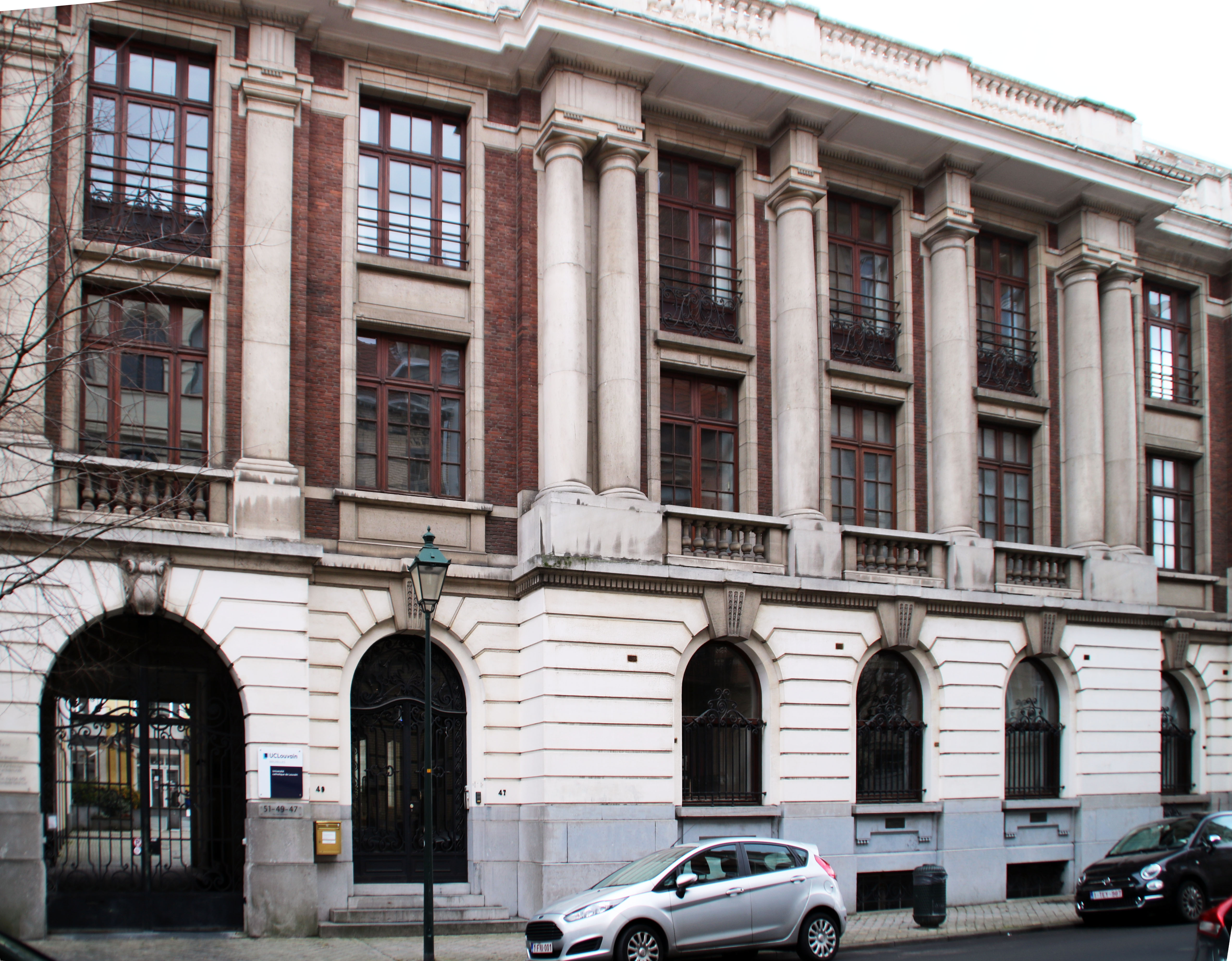 Laboratoire pharmaceutique